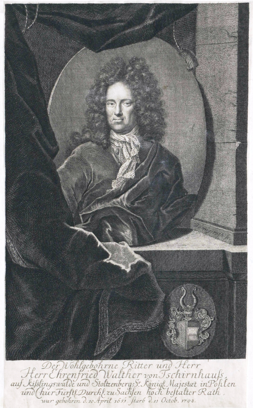 Stich des Naturforschers Ehrenfried Walther von Tschirnhaus.